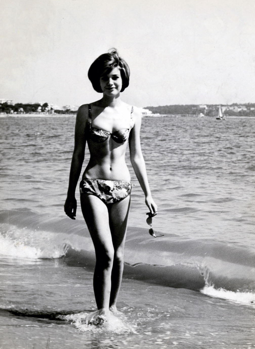 Catherine Spaak dans Diciottenni al sole de Camillo Mastrocinque et sorti en 1962